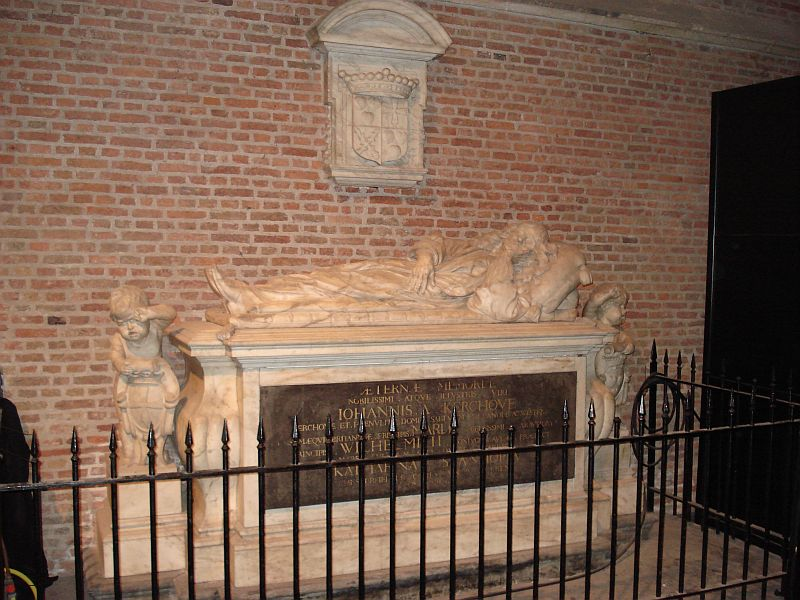 Ornamented grave in the Pieterskerk in Leiden. Praalgraf van Joh. a Kerchove in de Pieterskerk in Leiden. (Sculptor: Rombout Verhulst)